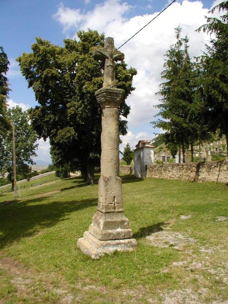 Kő obeliszk, a falut sújtó pestis járvány túlélői emelték